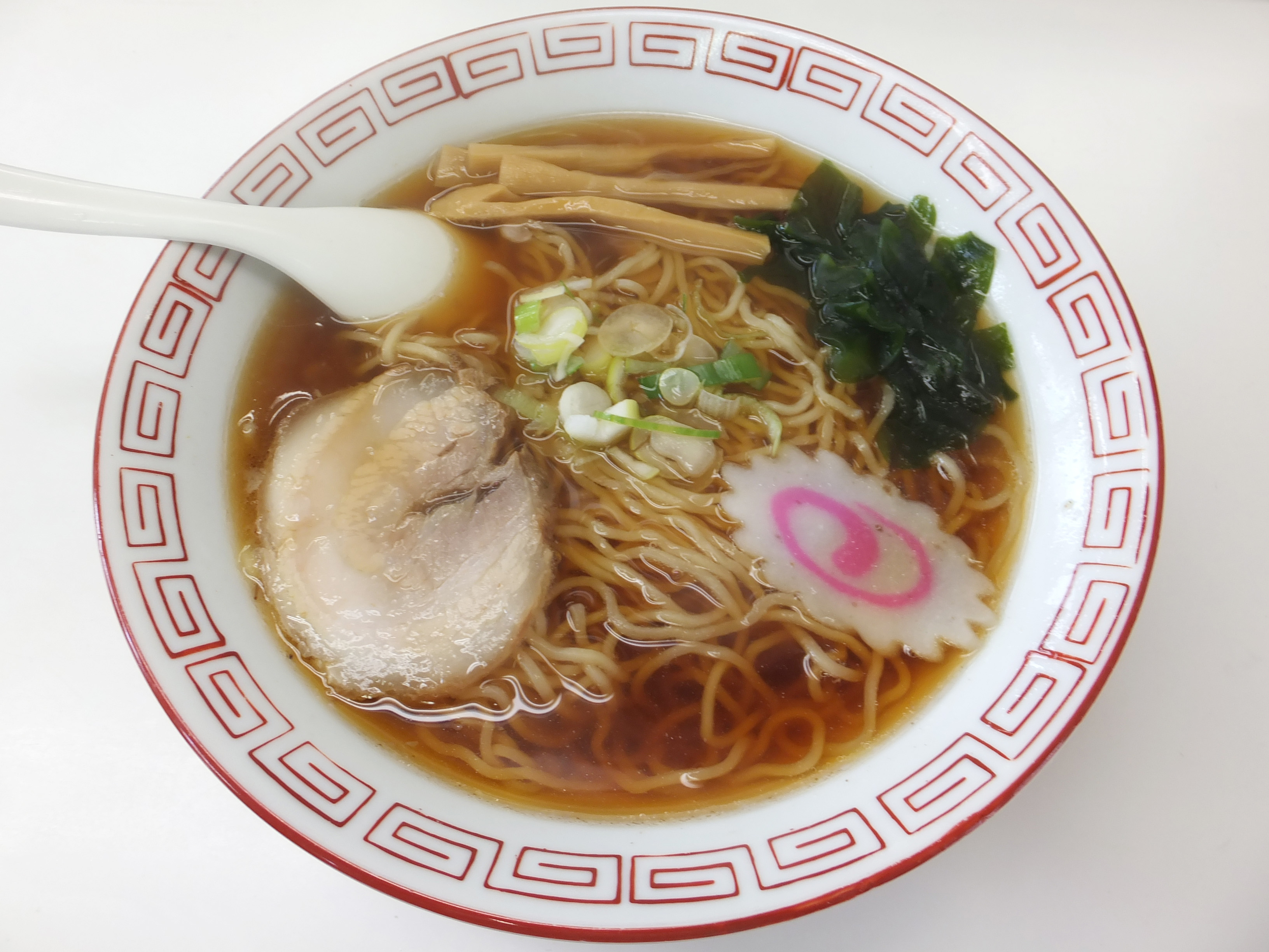 醤油ラーメン。春日部駅ホームのラーメン店「東武ラーメン」にて